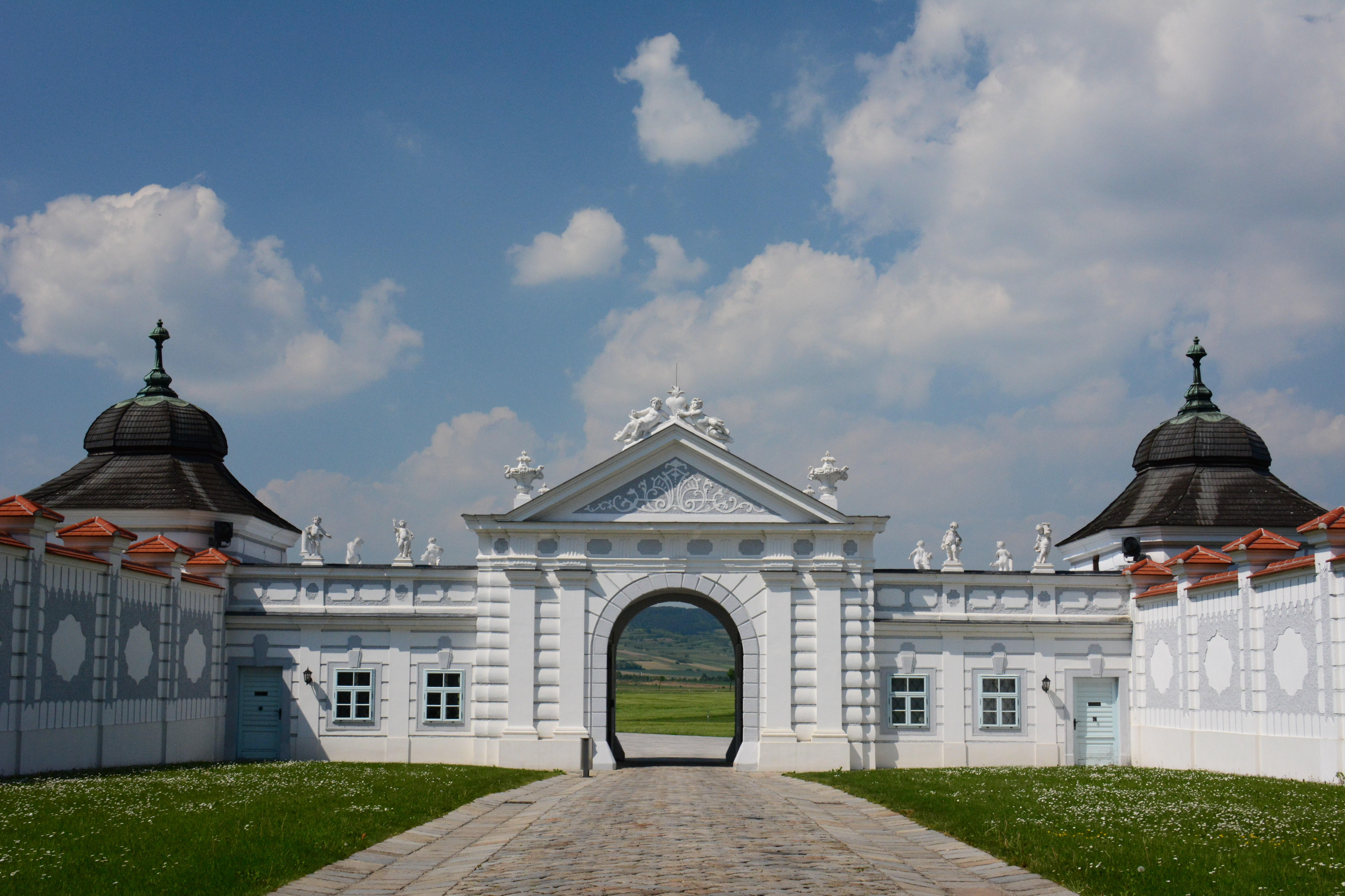 Gesamtanlage Augustiner Chorherrenstift Herzogenburg